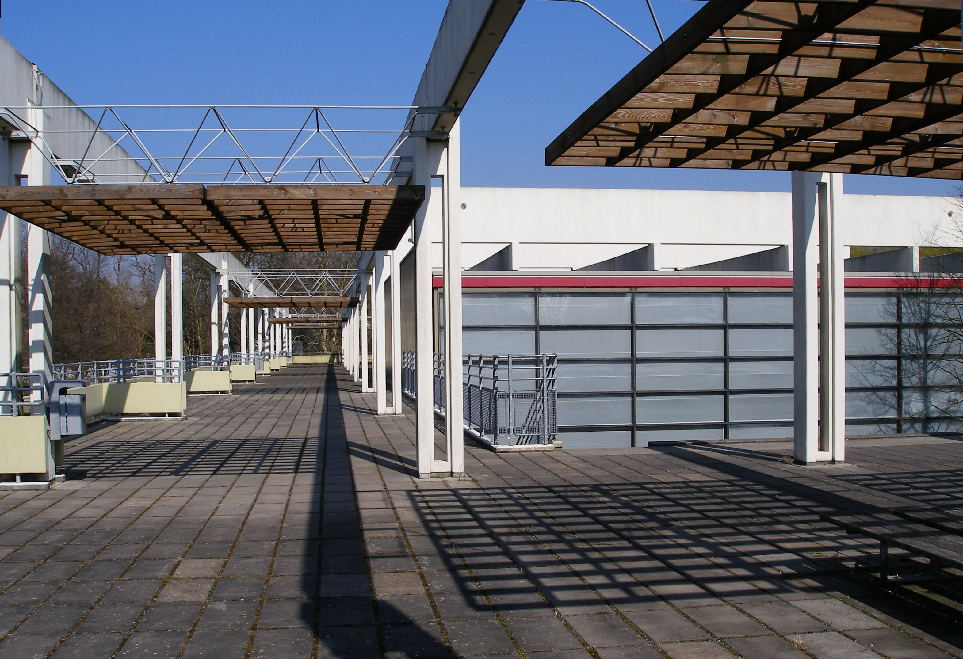 Christianeum, Hamburg; Architekt: Arne Jacobsen